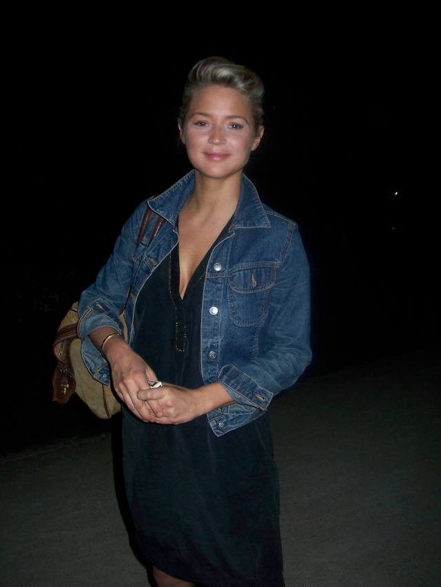 Virginie Efira après sa pièce de théatre "Nathalie Ribout"